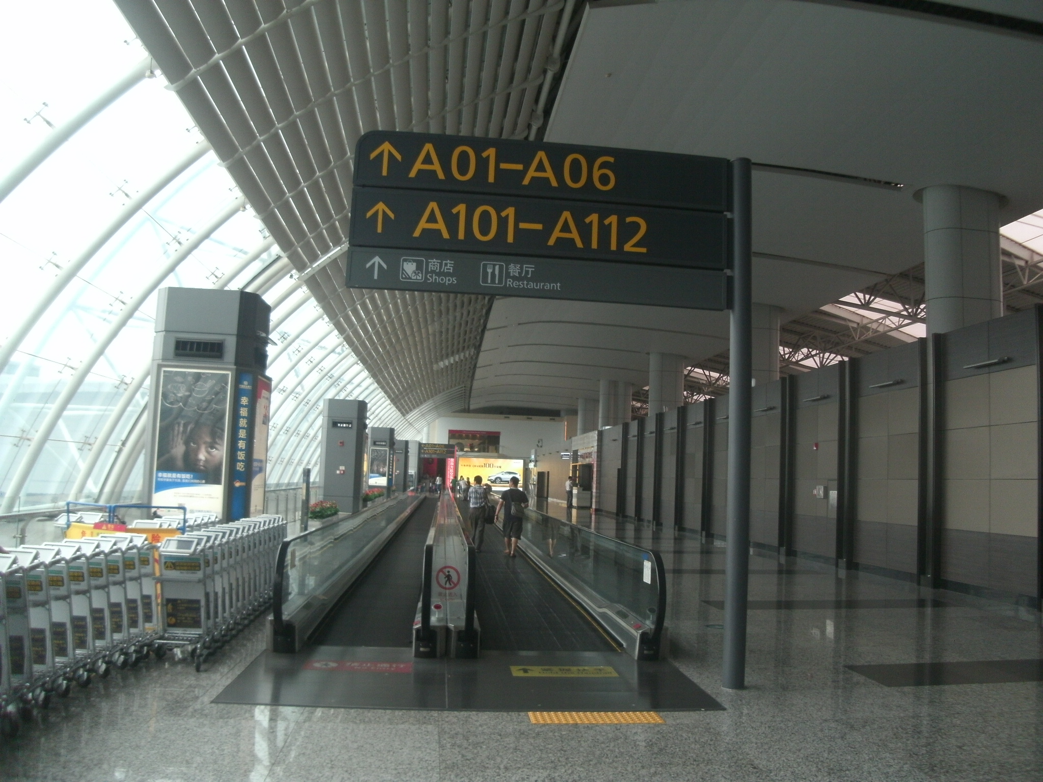 出国審査直後の通路。出国審査後、手前に免税店などが集中しており、各ゲートはさらにその奥となるため（最低20分はかかる）、時間に余裕を持って入国審査を済ませることを推奨する。